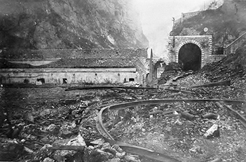 Vista storica del forte Tombion.